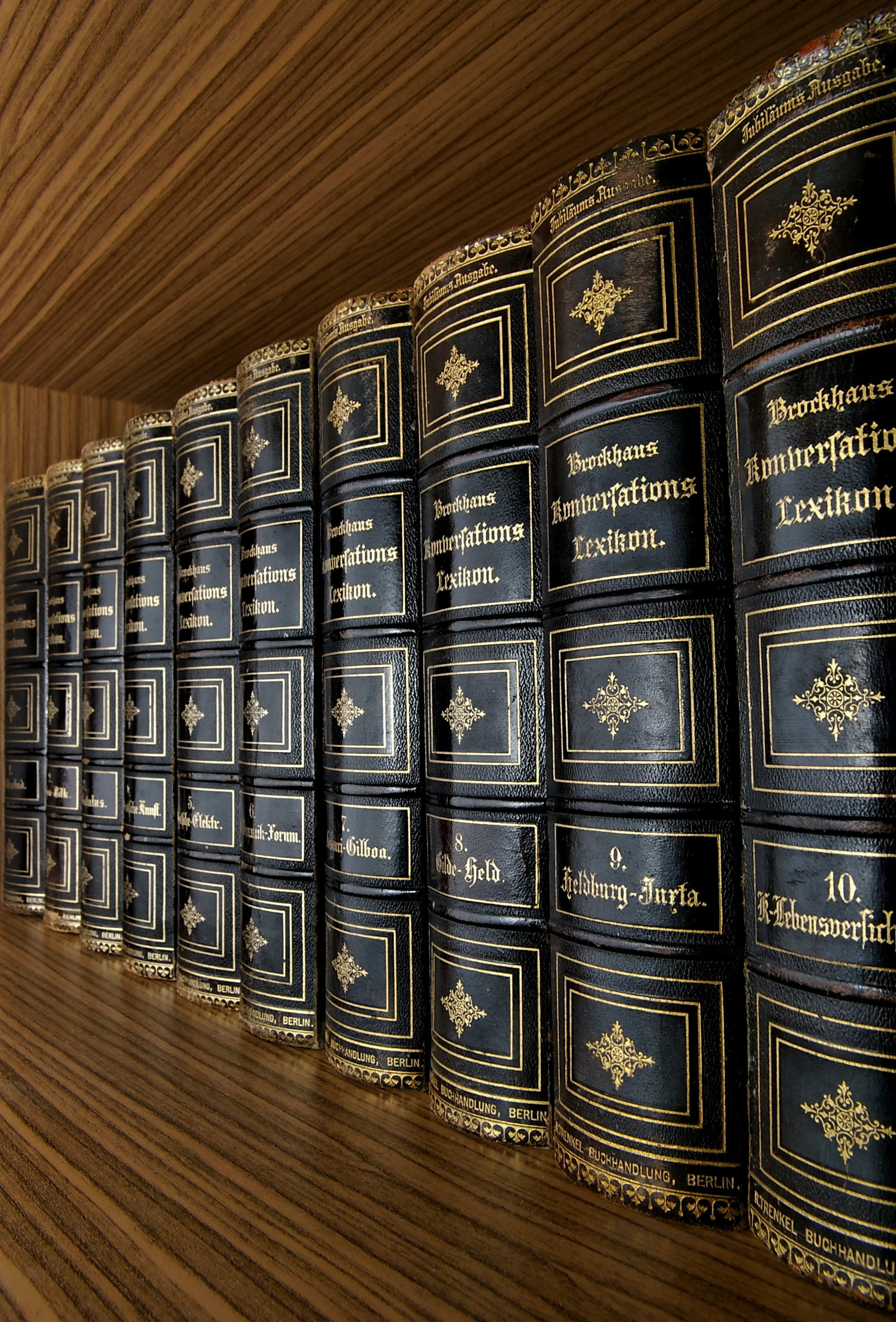 Brockhaus Enzyklopädie in der 14. Auflage als Konversations-Lexikon in 16 Bänden von 1896